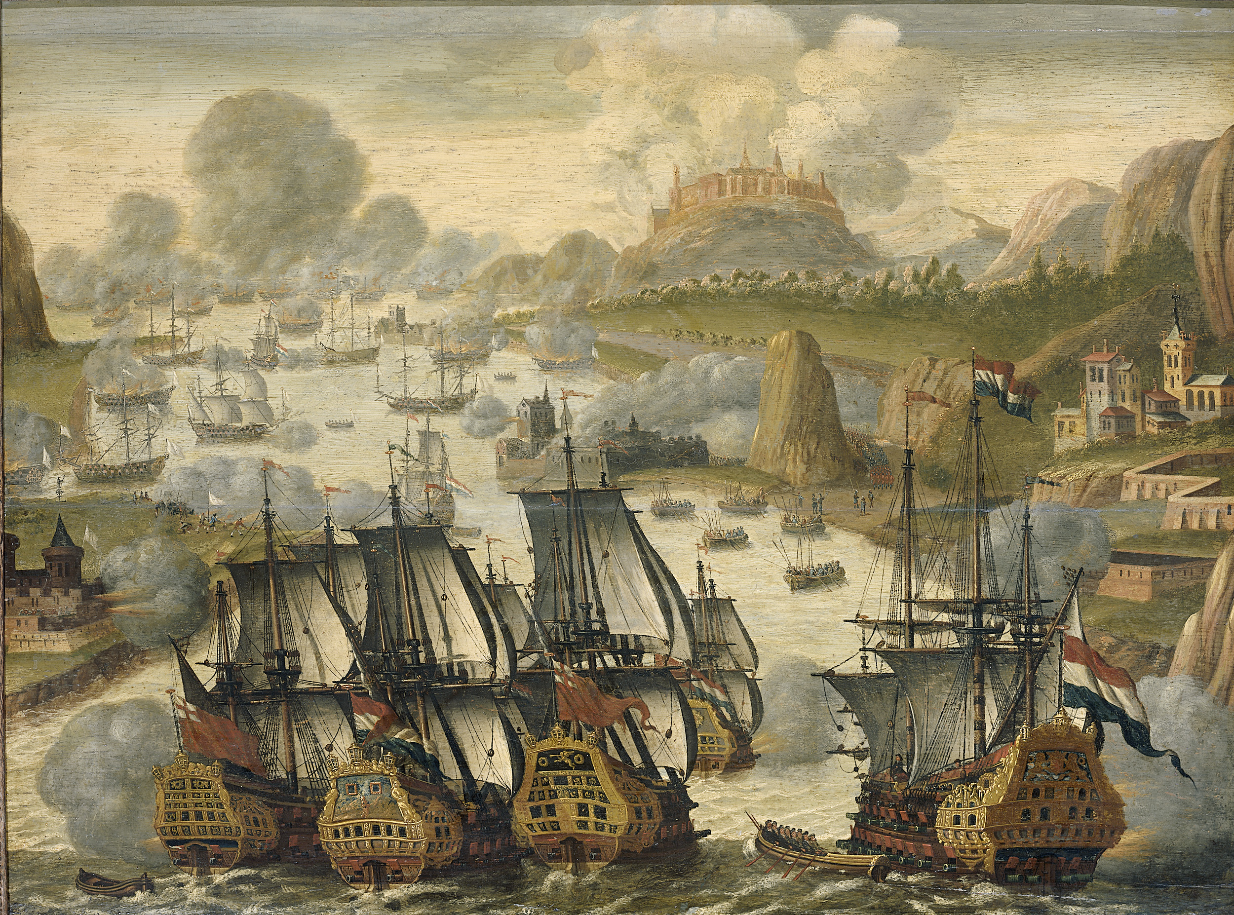 Zeeslag in de baai van Vigo, 23 oktober 1702. Episode uit de Spaanse Successieoorlog. Overval van de gecombineerde Engelse en Hollandse vloten, op de voorgrond, op de Spaans-Franse vloot. De baai is vol met oorlogsschepen en sloepen, vanaf de kust vuren kanonnen op de schepen.